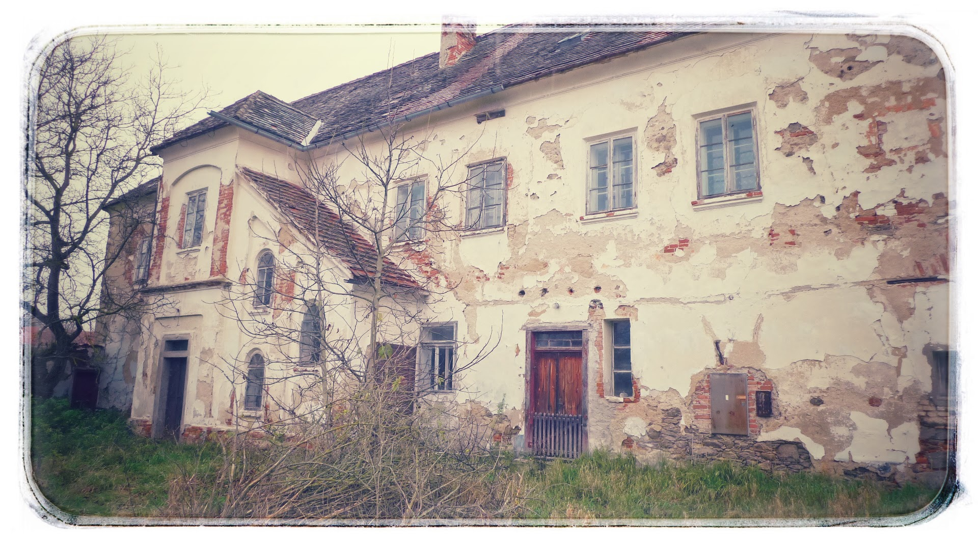 Tvrz v Kožlí u Čížové - pohled z jižní strany ze dvora